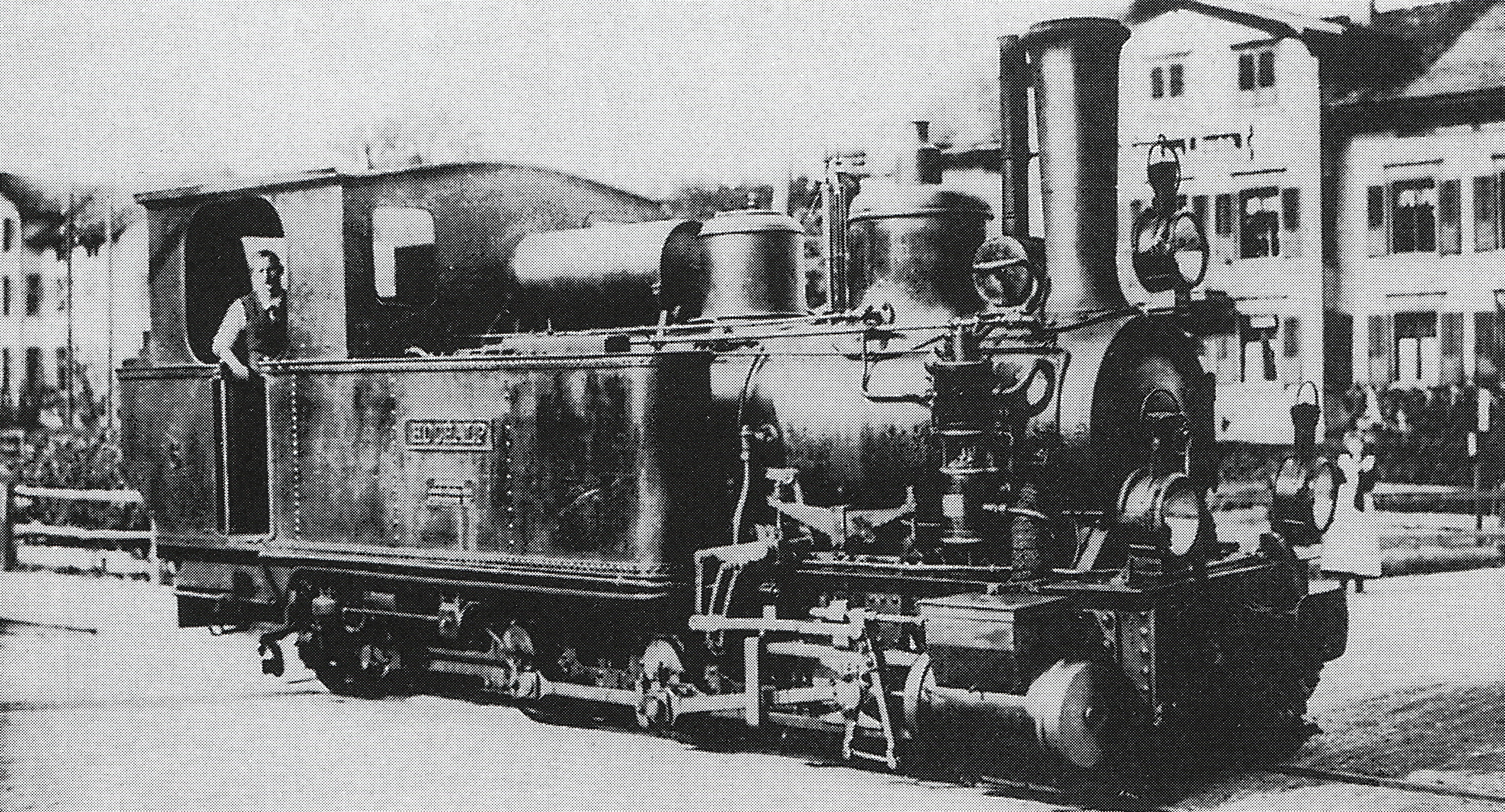 Tender-Locomotive G 3/4 Nr. 6 Hochalp der Appenzeller Bahn, gebaut 1887 inn der Schweizeriſchen Locomotiv- und Machines-Fabrique zů Winterthur (Fabr.-Nr. 459), 1941 außer Dienſt geſtellt und anſchließend abgebrochen.